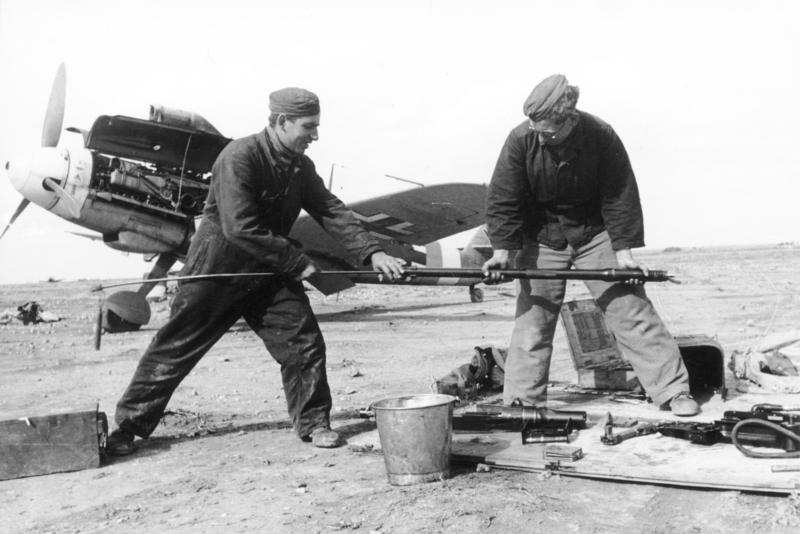 15.3.1942 Eine Kanone von einer Me 109 wird gereinigt